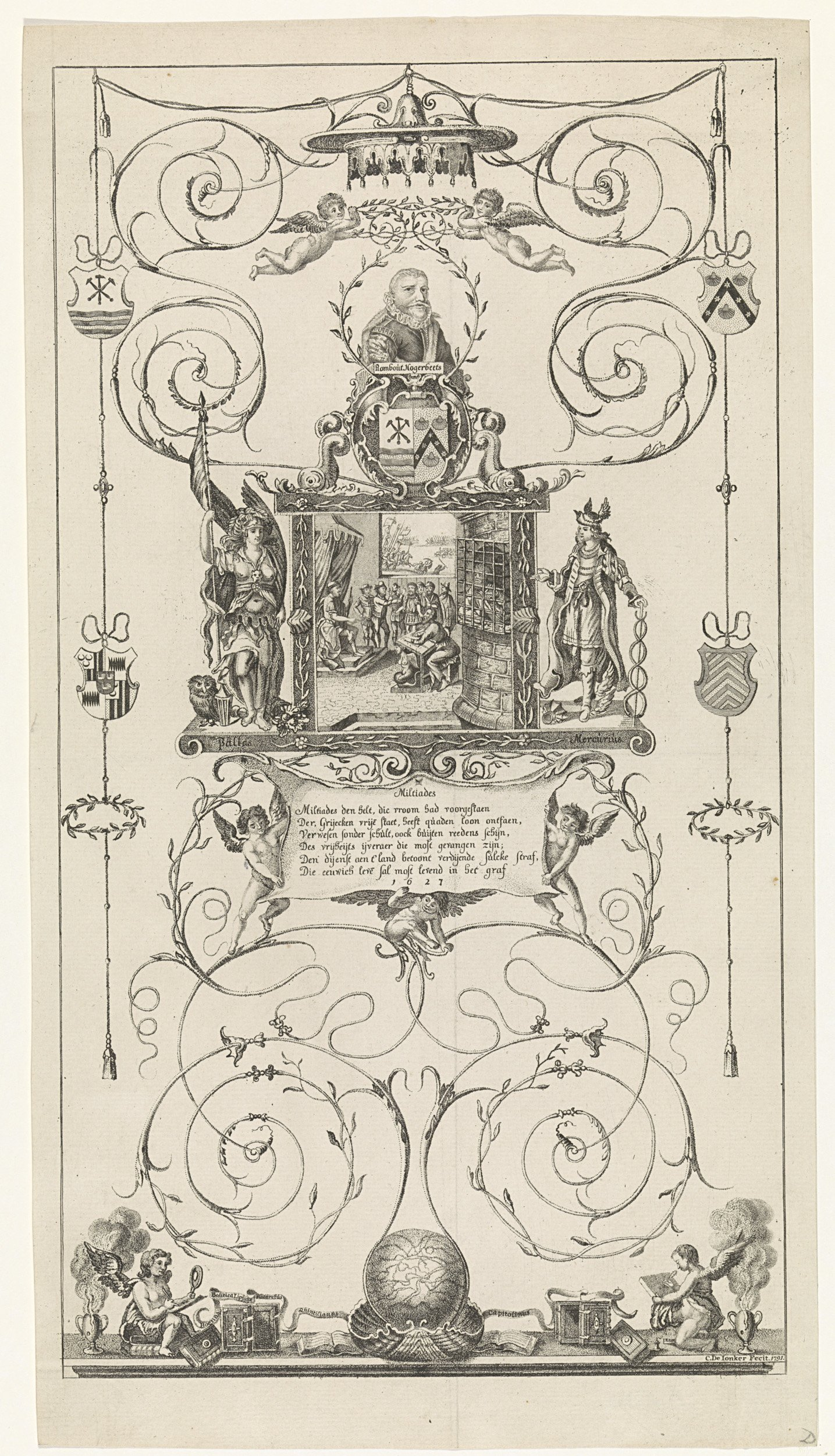 Glasscheibe mit Szene aus dem Leben des Miltiades, mit Büste von Rombout Hogerbeets, 1627. Publiziert in: Jonker, Cornelis de: Zinneprent ter ere van Rombout Hogerbeets, 1791. Miltiades ist im Gefängnis nach Jahren treuer Dienst. An den Seiten befinden sich Pallas und Merkur. Unter der zentralen Szene steht ein sechszeiliges Gedicht: Das Fenster war Teil einer Reihe von drei allegorischen Glasfenstern zum Gedenken an Gefangenschaft, Flucht und Exil von Hugo Grotius 1619-1622. Das Fenster wurde Im Jahr 1627 für das Haus von Abraham Daatselaar, eines Kaufmanns (Gorcum/Gorinchem), angefertigt, der Grotius zu entkommen half.